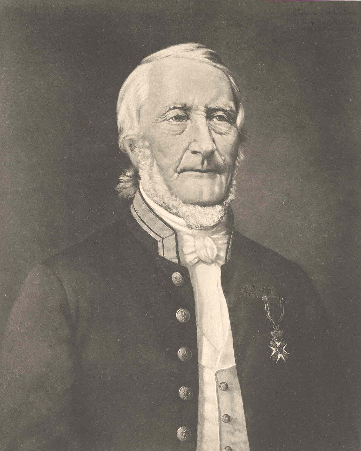 Christian Cornelius Paus (1800-1879), stortingsrepresentant, byfoged, politimester, byskriver og magistrat i Skien